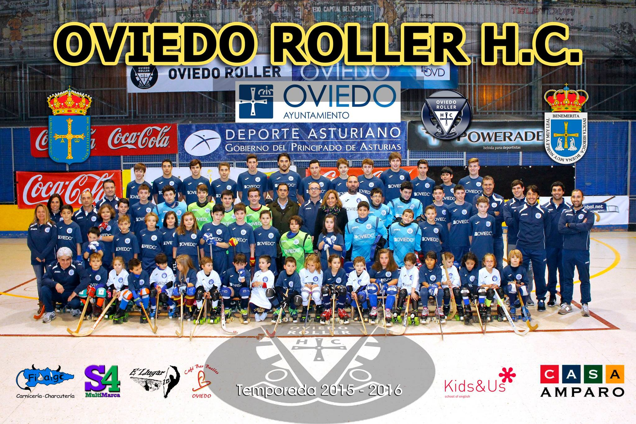 Equipo de Hockey patines Oviedo Roller HC. Temporada 2015-2016